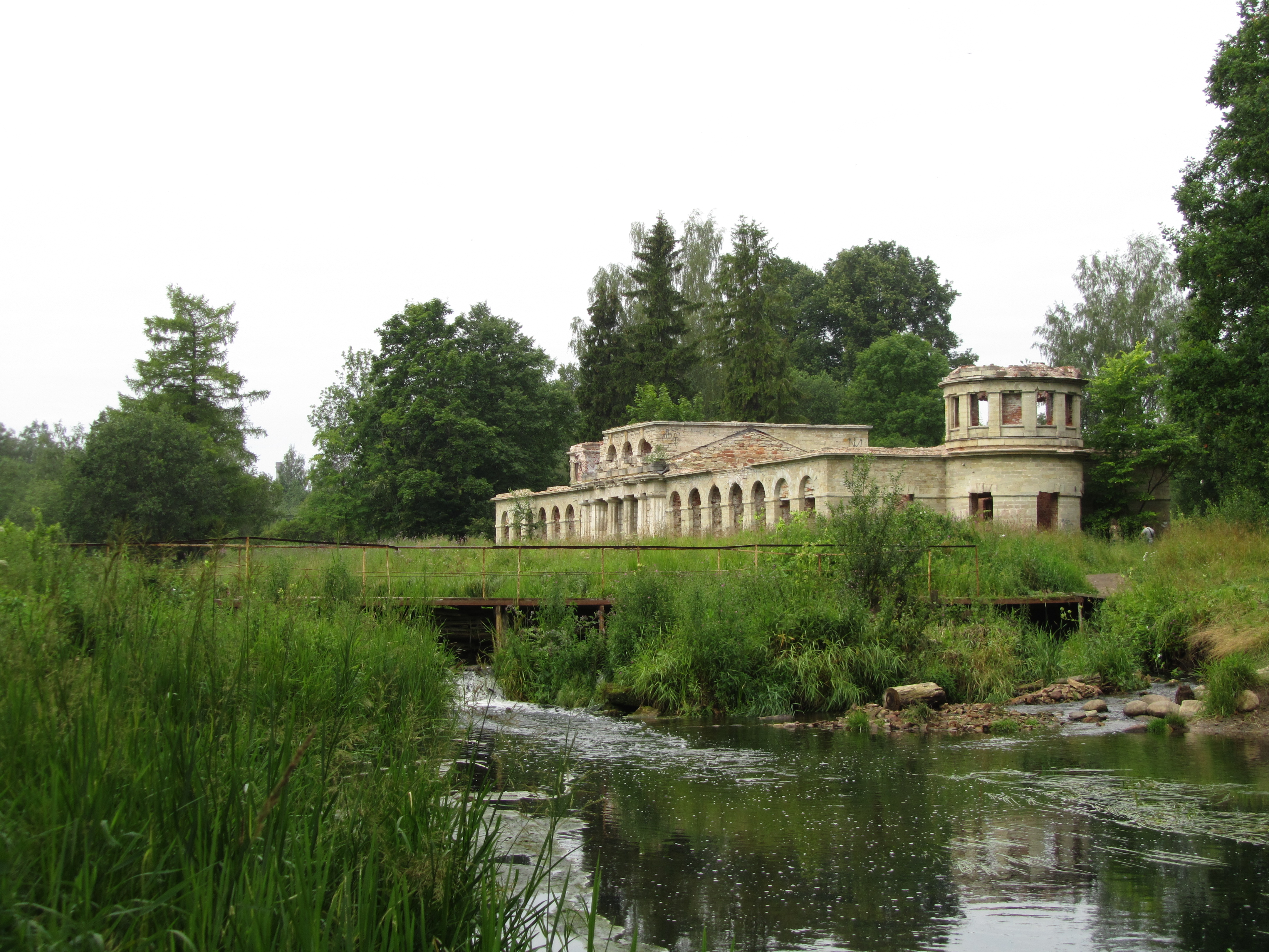 "Птичник" у Плотины-каскада, 2012 г.